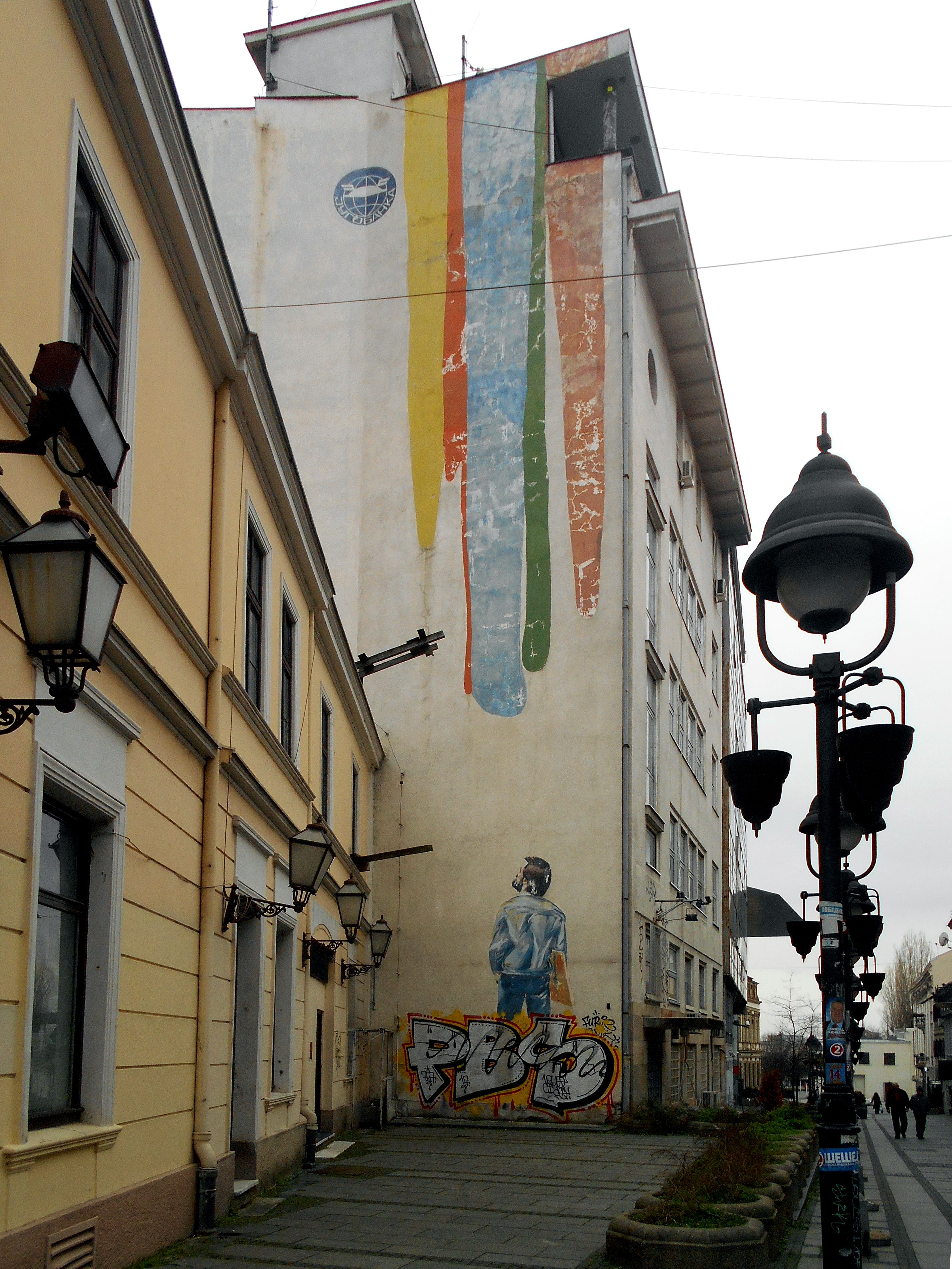 Mural u Rajićevoj ulici, na zidu pored zgrade Galerije Izlozi Fakulteta likovnih umetnosti (Čedomir Vasić, 1984)